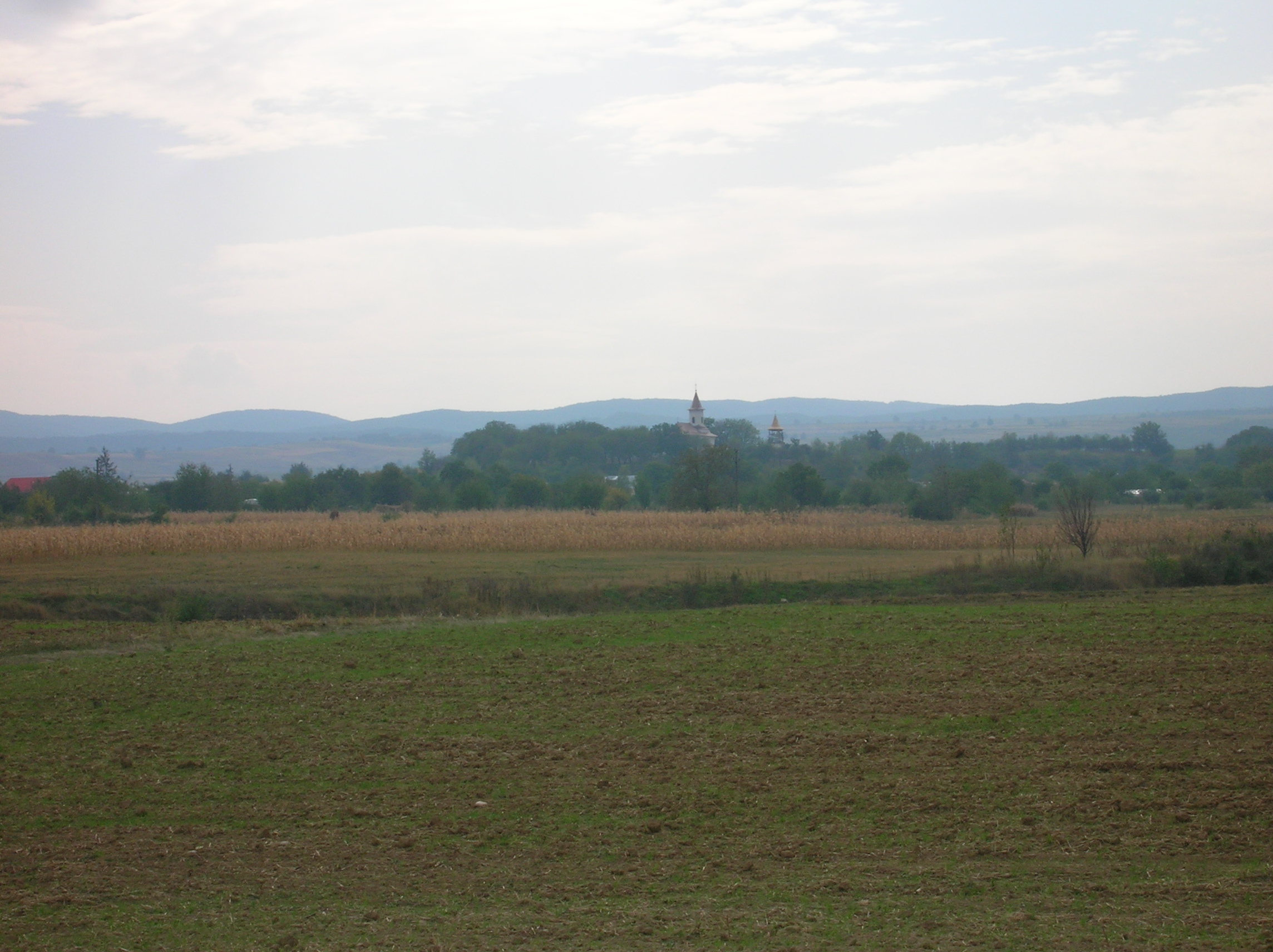 Comuna Valea Seacă Bacău - Satul Mândrişca - Spre Biserica Sfântul Ierarh Nicolae de pe DN2